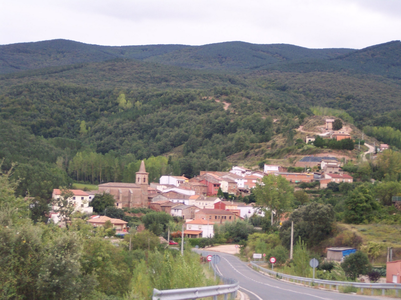 Imagen general del pueblo desde la carretera de Hornos.